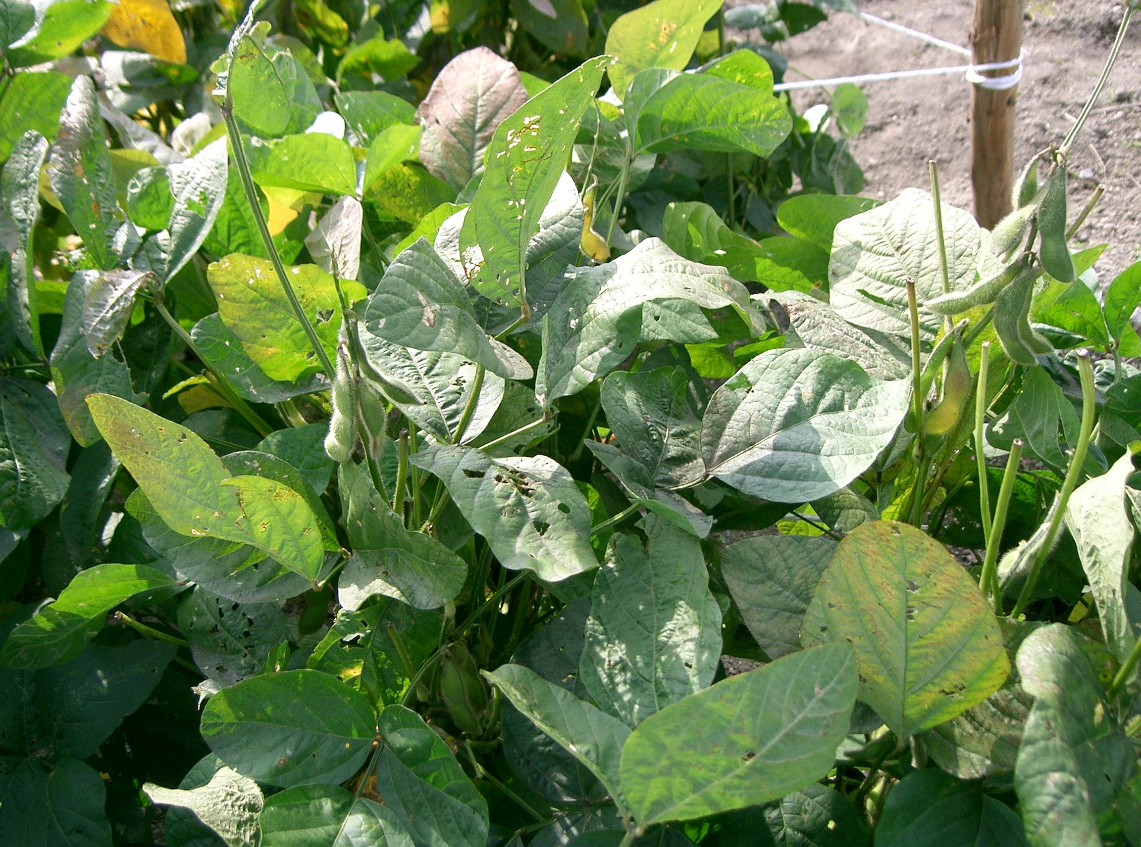 Glycine max